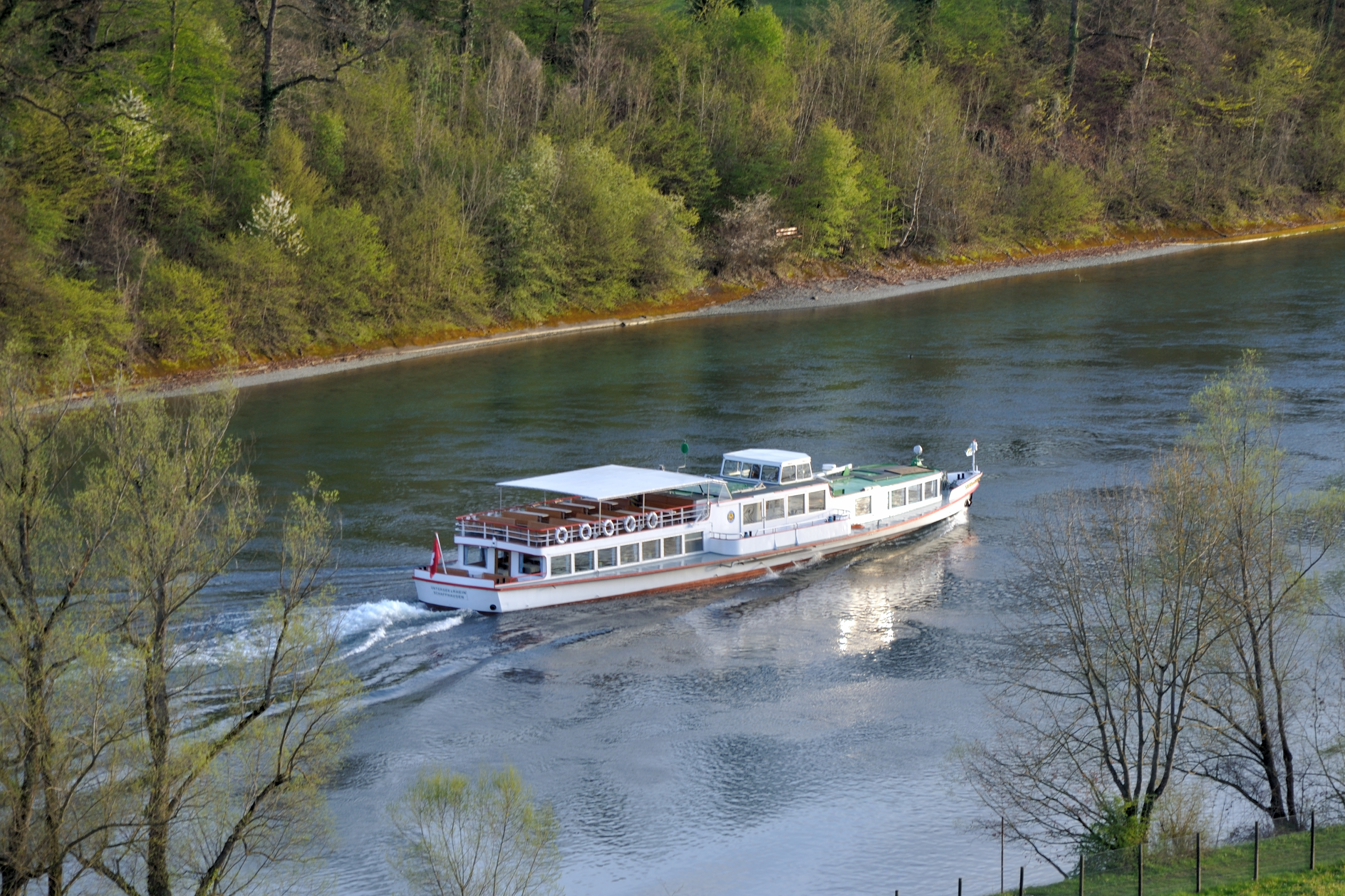 Switzerland, Canton of Schaffhausen, Dörflingen in spring